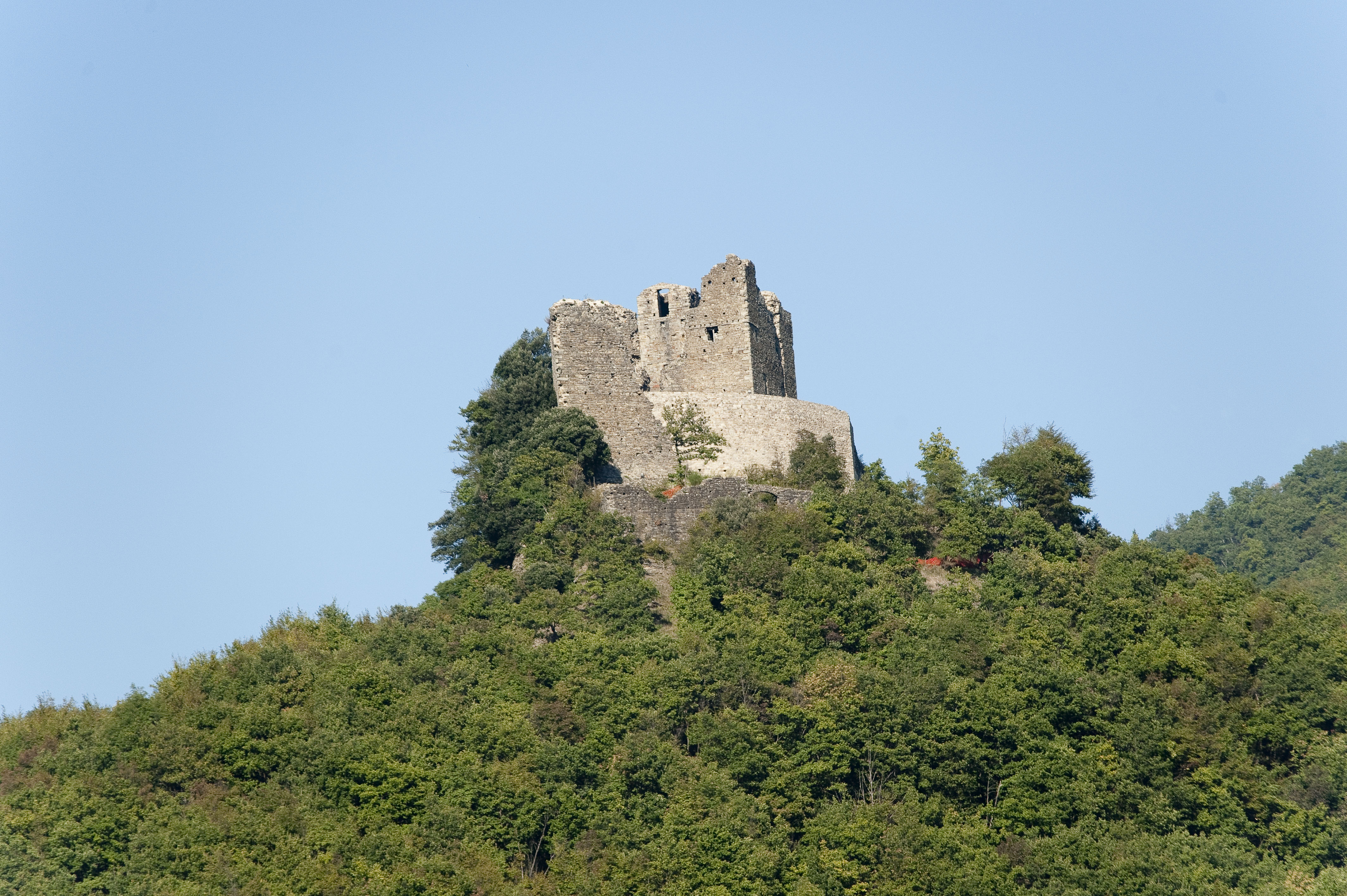 Rocca di Cerbaia, Cantagallo, Prato